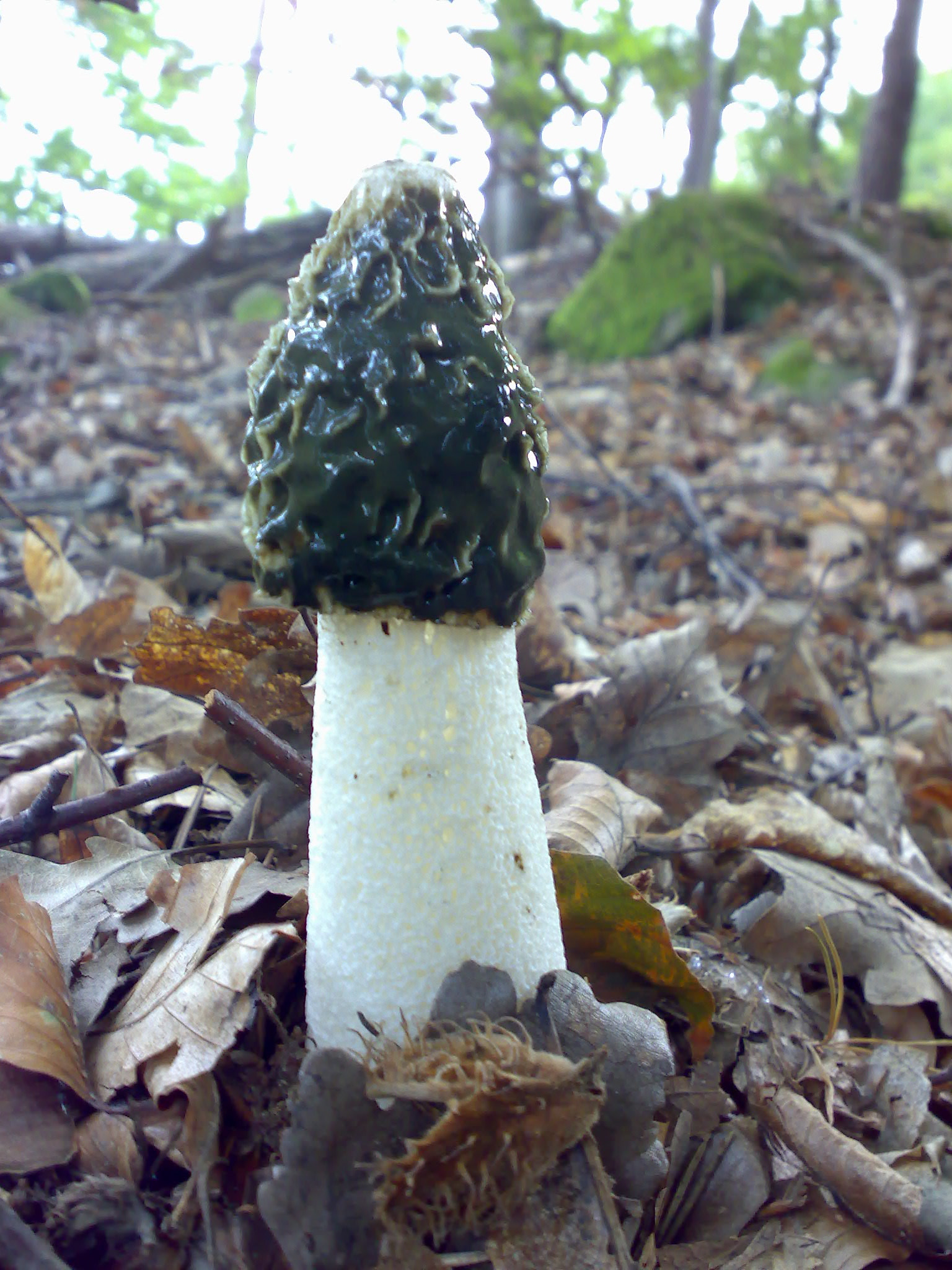 Phallus impudicus, Stinkmorchel. Fotografiert am Bodanrück im September 2006.